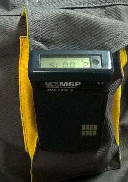 Оперативний дозиметр MPG DMC 2000s